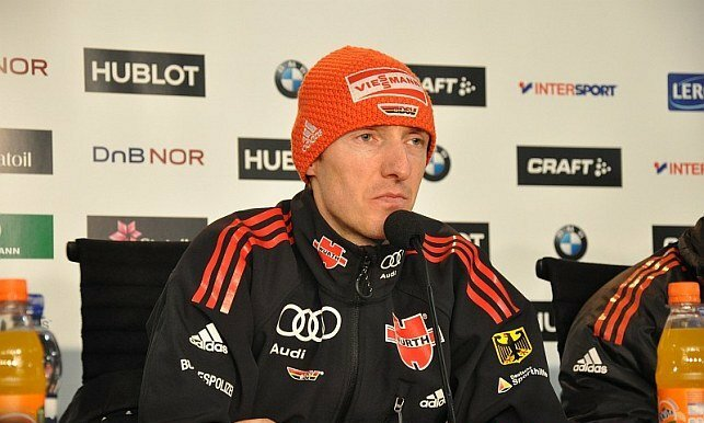 Michael Uhrmann na konferencji prasowej po konkursie drużynowym mężczyzn na skoczni normalnej podczas Mistrzostw Świata w Narciarstwie Klasycznym 2011 w Oslo.